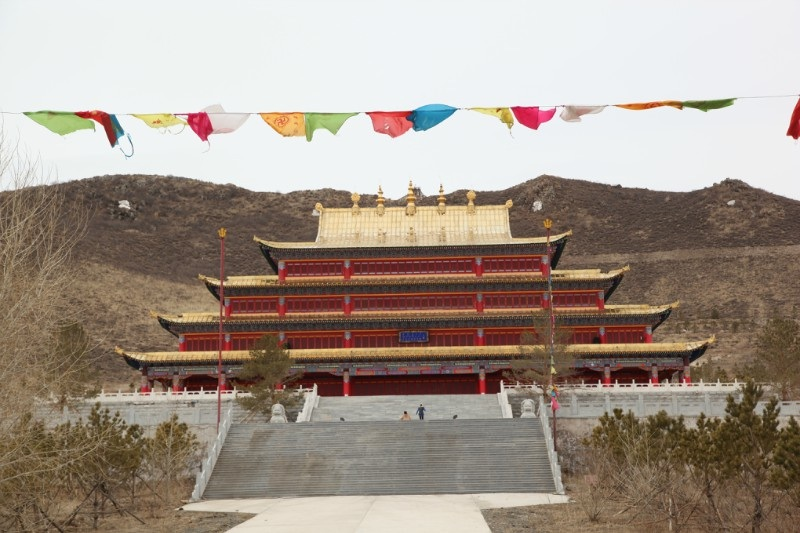 中文（中国大陆）: 吉林白城葛根庙5